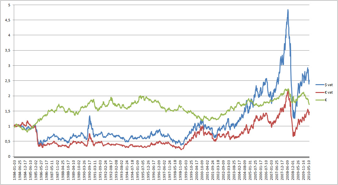 Olieprijs ontwikkeling 1984-2010 in dollar en euro, 1984=1